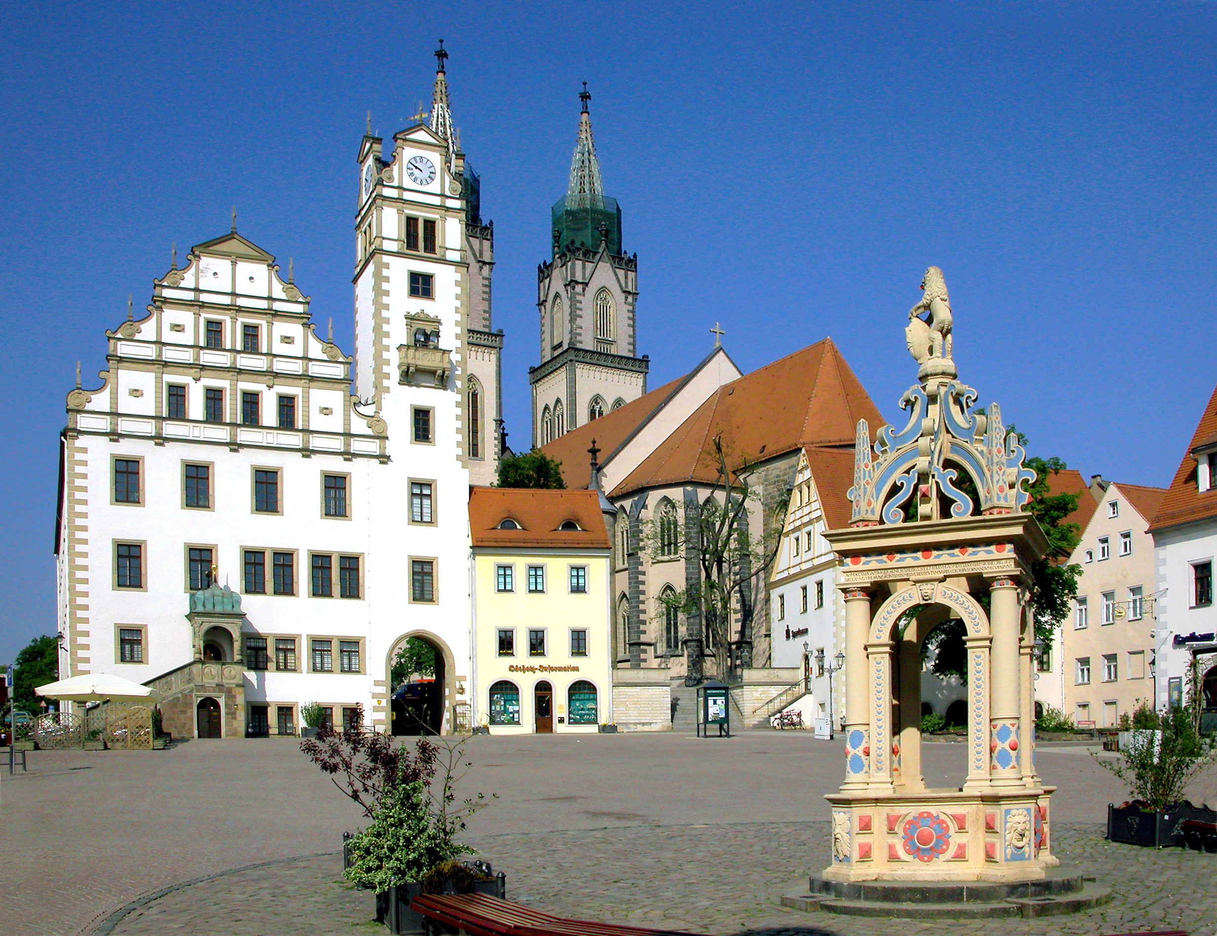 03.05.2009 04758 Oschatz: Neumarkt v.l.n.r.: Neumarkt 1: Rathaus (GMP: 51.297324,13.108529). Renaissancebau 1538 von Bastian Kramer, vielfach verändert, 1842 durch Brand beschädigt, wiederaufgebaut nach Plänen von Gottfried Semper. Neumarkt 2: Heute Oschatz Information. Durchblick zur Aegidienkirche (Spätgotik, 1443 /1846-1849) Sporerstraße 1 / Ecke Neumarkt: Ehemalige Fleischbänke (1266), 1677 bis 1912 Militärhauptwache; heute Stadt- u. Kreissparkasse. Rechts angeschnitten: "Gasthaus Zum Schwan", Sporerstraße 2 / Ecke Neumarkt. Im Vordergrund der Marktbrunnen (1588 von G. Richter aus Leipzig). [DSCN37073.TIF]20090503010DR.JPG(c)Blobelt